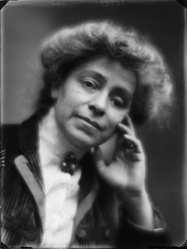 Gemma Ferruggia fotografata da Mario Nunes Vais